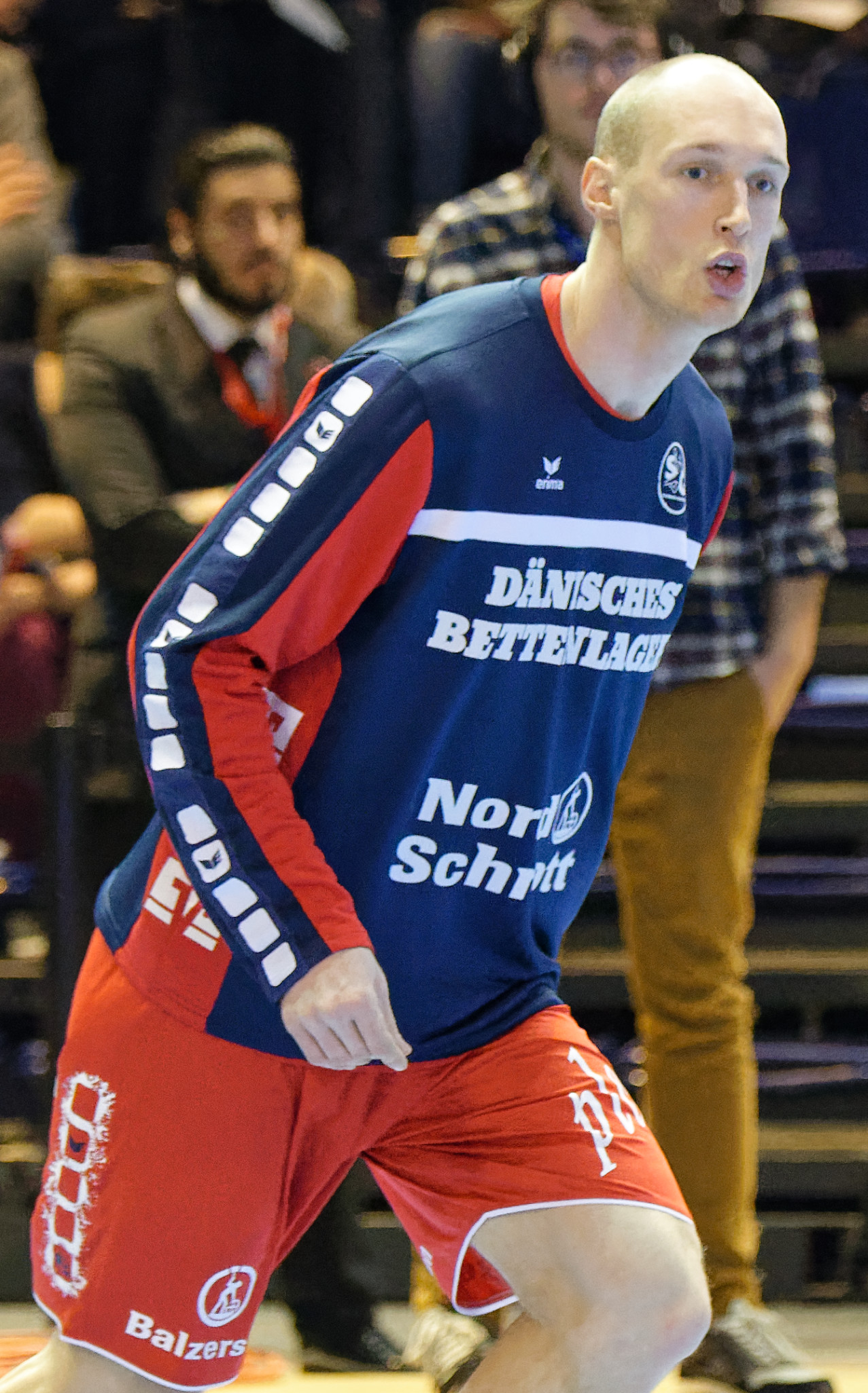 Rencontre de phase de groupe de la Ligue des Champions 2015-16 entre le PSG et SG Flensburg. A la Halle Carpentier (Paris), le 7 mars 2016.